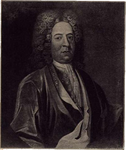 Kjøpmann James Collett (1655—1727) på hans eldre dager.